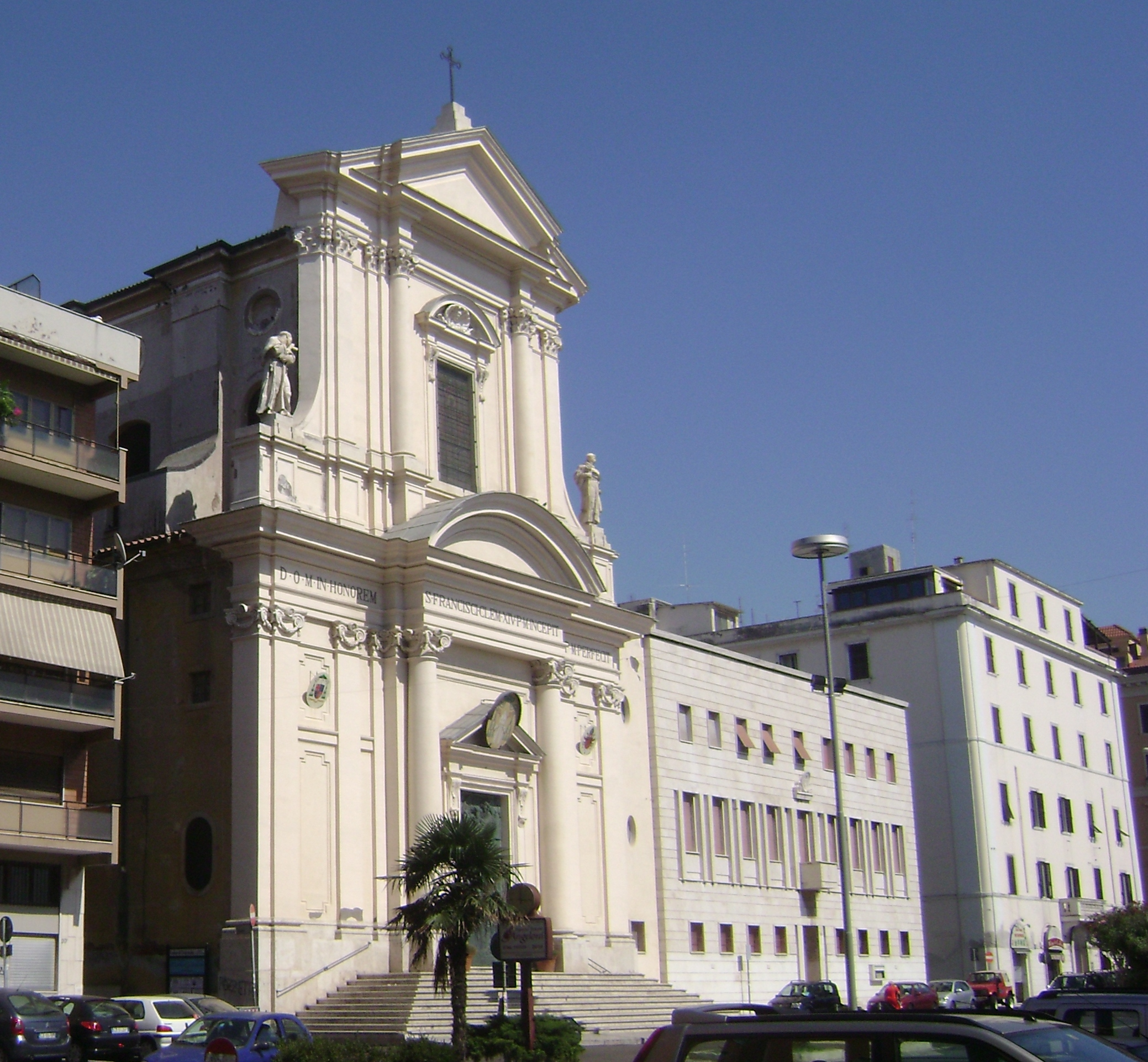 vista laterale della facciata della cattedrale di civitavecchia